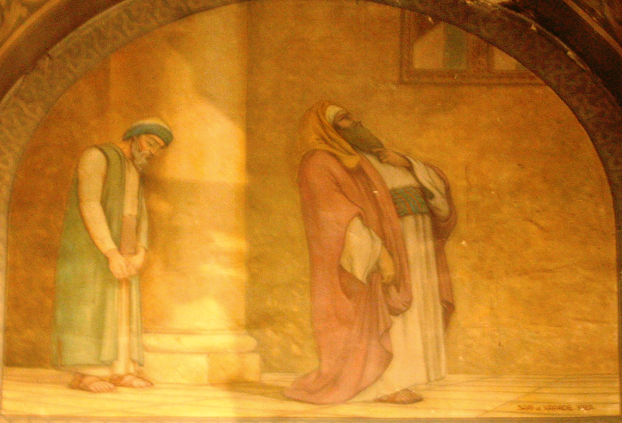 église Saint-Joseph de Marseille (124 rue Paradis) - fresque représentant le Pharisien et le Publicain réalisée par Charles Varade et Jean Sari.